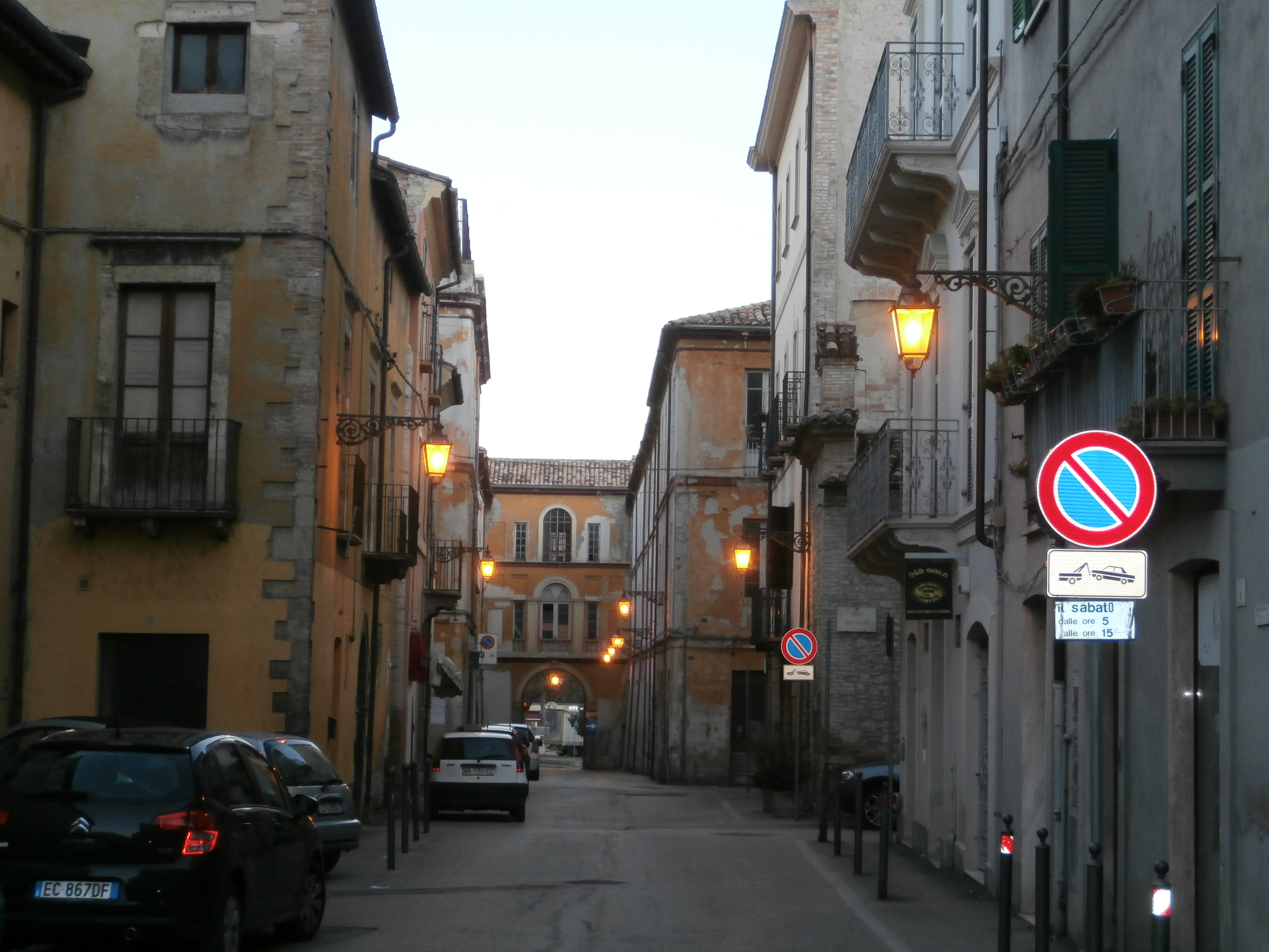 Porta melatina